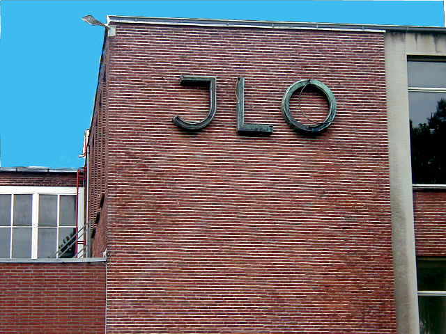 Firmenlogo der ILO-Motorenwerke (Der Schriftzug „JLO“ wurde als Design-Variante für Firmenlogo und Motorennamen mit der handschriftlichen Form des Großbuchstabens I vor dem Druckbuchstaben L benutzt. Der andere Schreibstil ILO wurde im Schriftverkehr benutzt und ist richtig.)